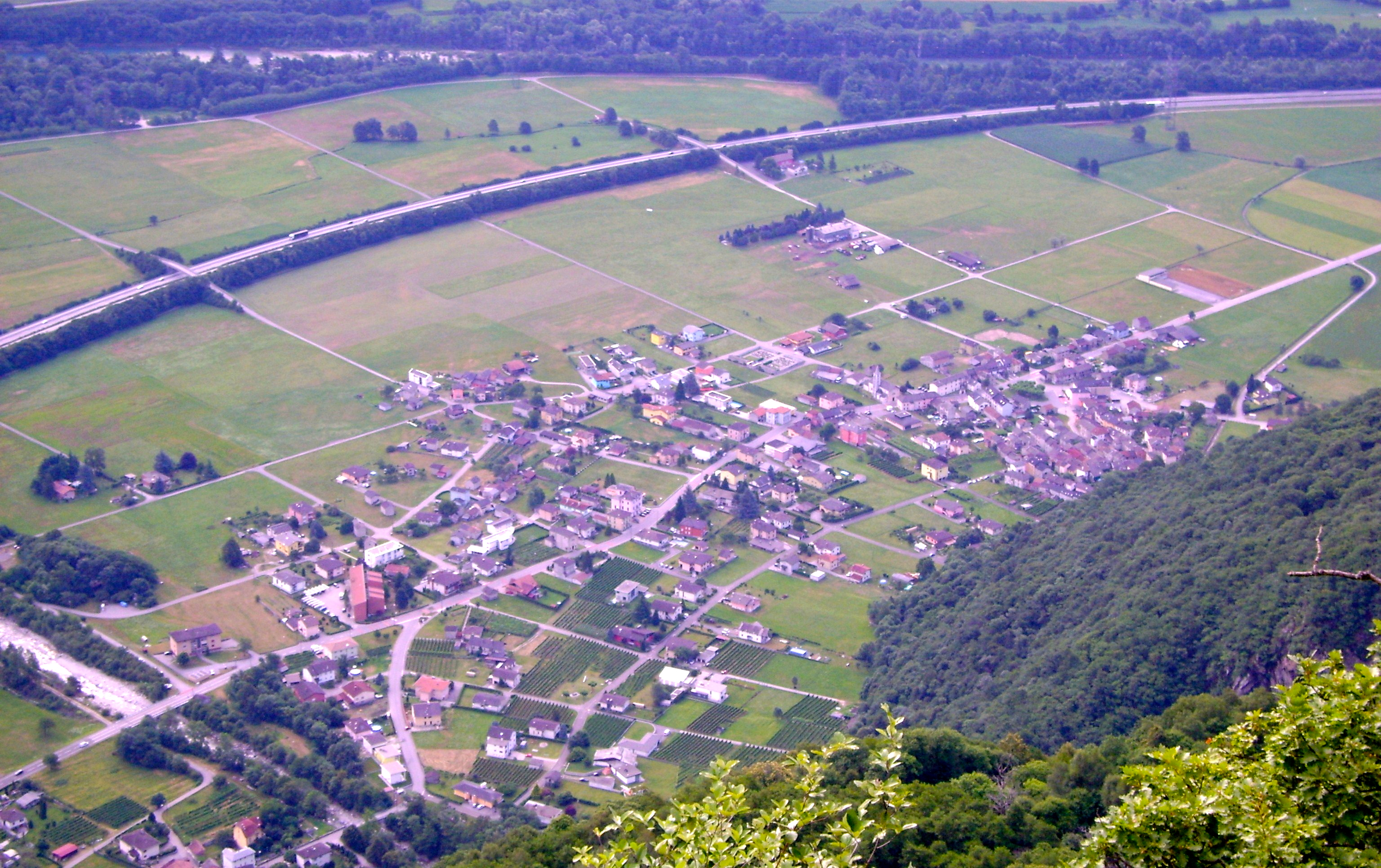 Preonzo ripreso dall' alto